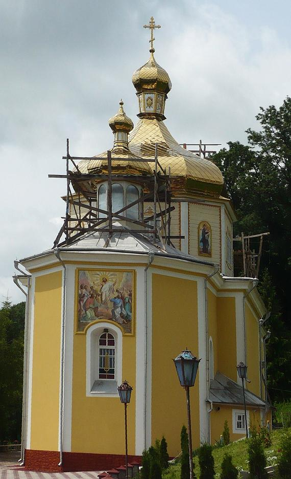 Wiśniowiec, cerkiew